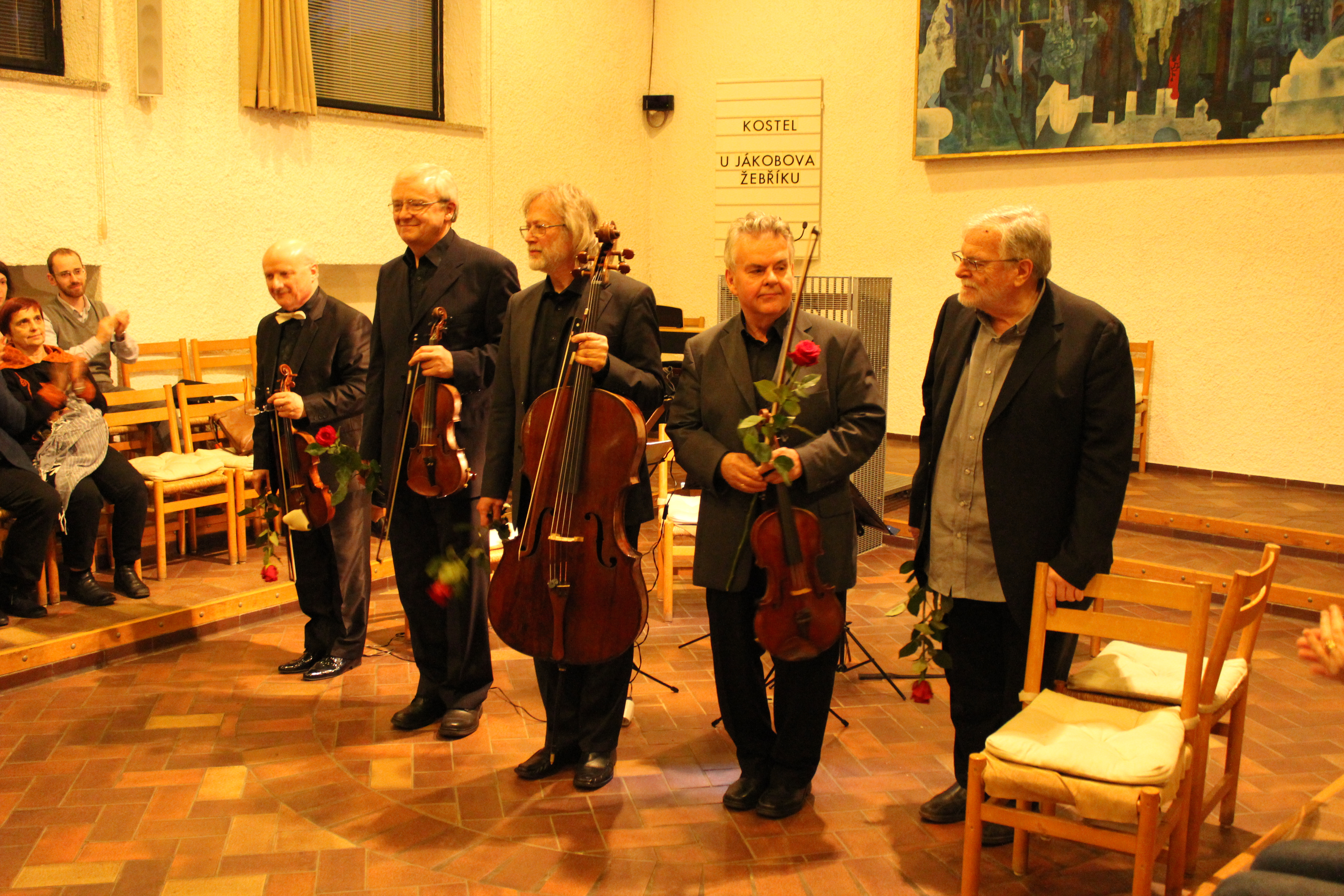 Koncert Stamicova kvarteta dne 5. dubna 2018 v pražském kostele U Jákobova žebříku. Personality rights warningAlthough this work is freely licensed or in the public domain, the person(s) shown may have rights that legally restrict certain re-uses unless those depicted consent to such uses. In these cases, a model release or other evidence of consent could protect you from infringement claims.